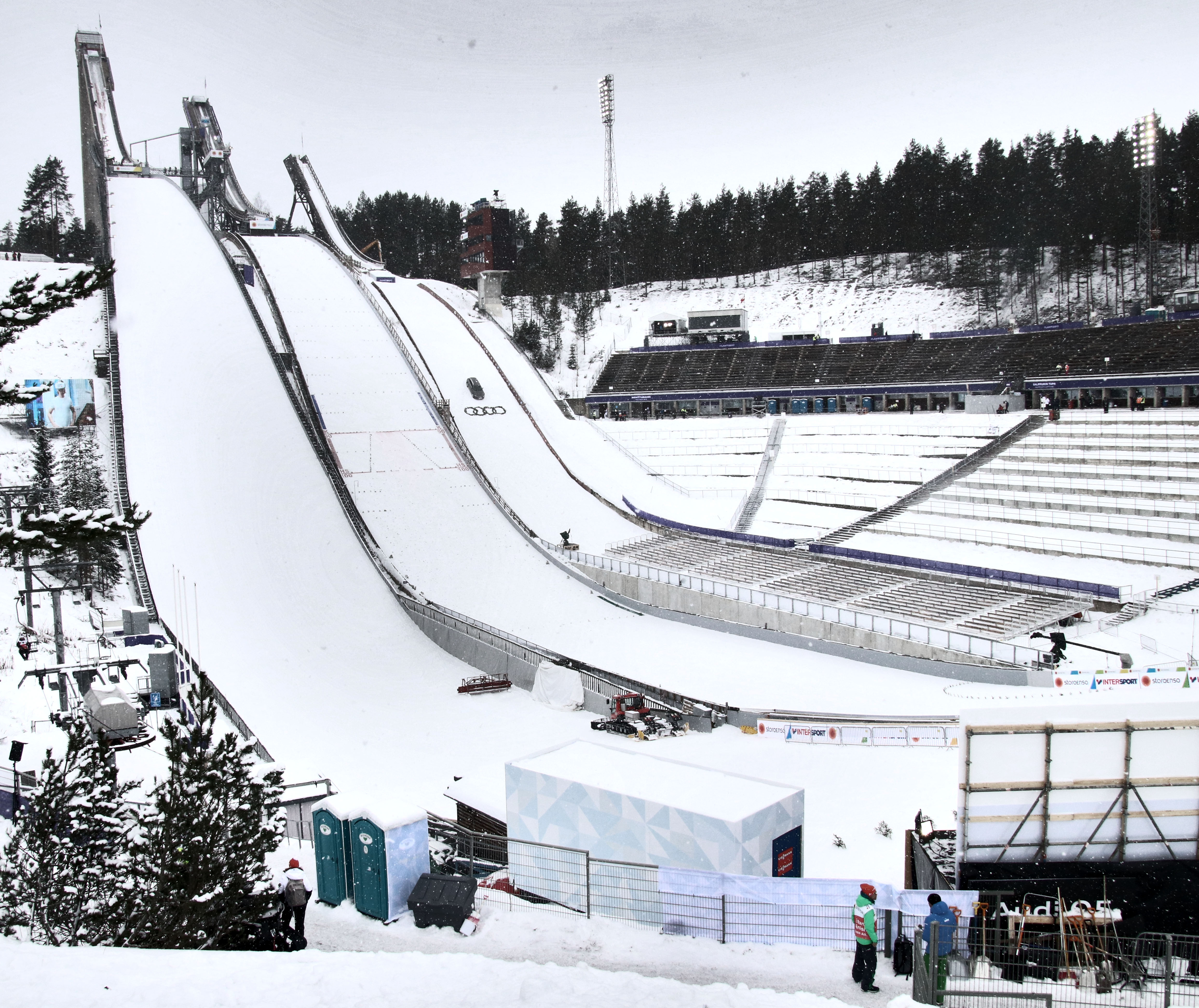 Lahti. The ski jumping hill.